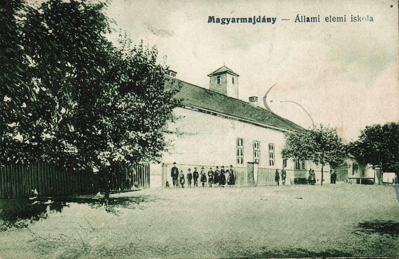 Magyarmajdányi Állami elemi iskola 1910 körül, Vajdaság